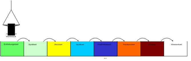 HSVWE